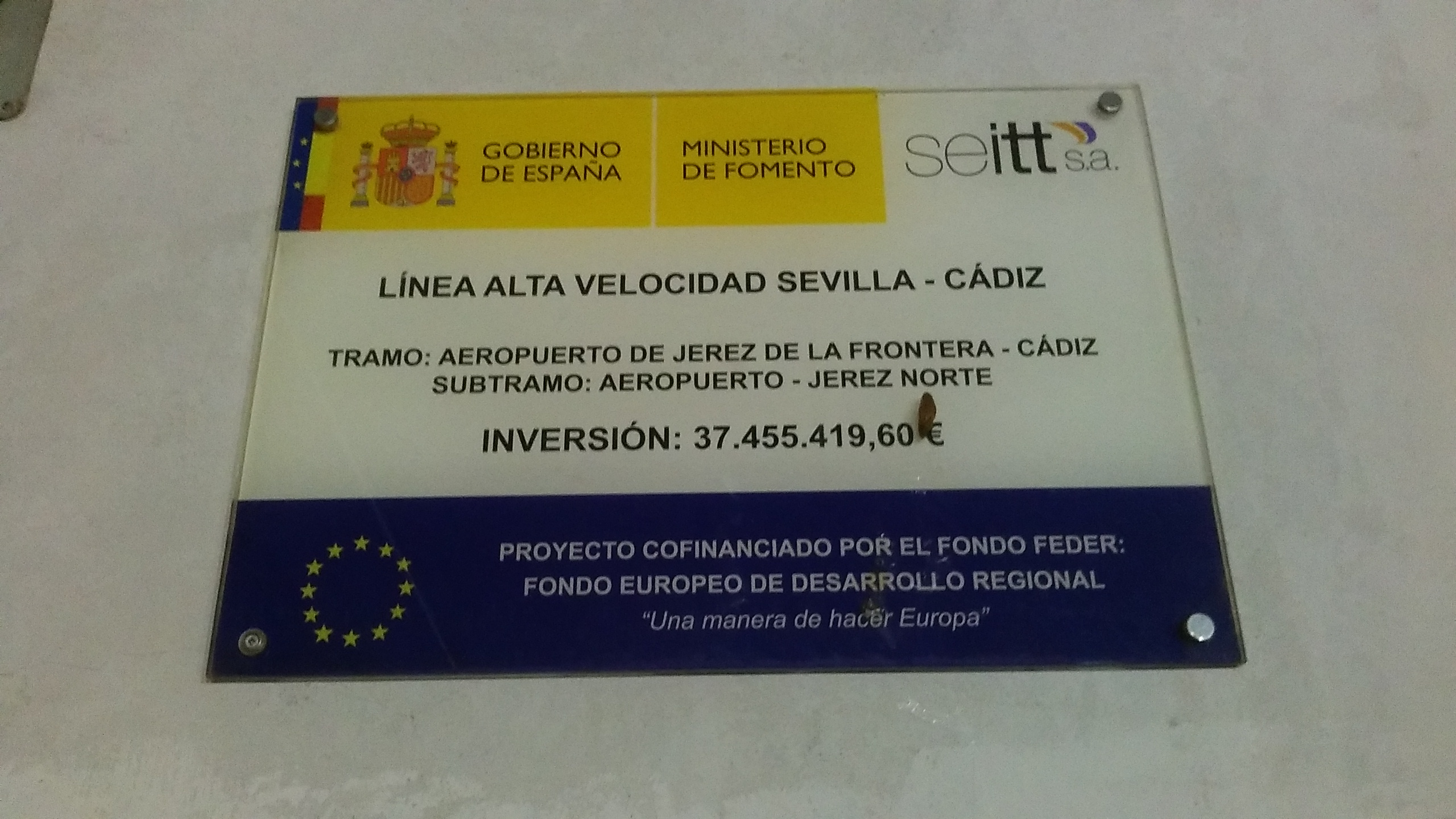 Placa en paso subterráneo de Jerez por la vía férrea de alta velocidad Sevilla - Cádiz